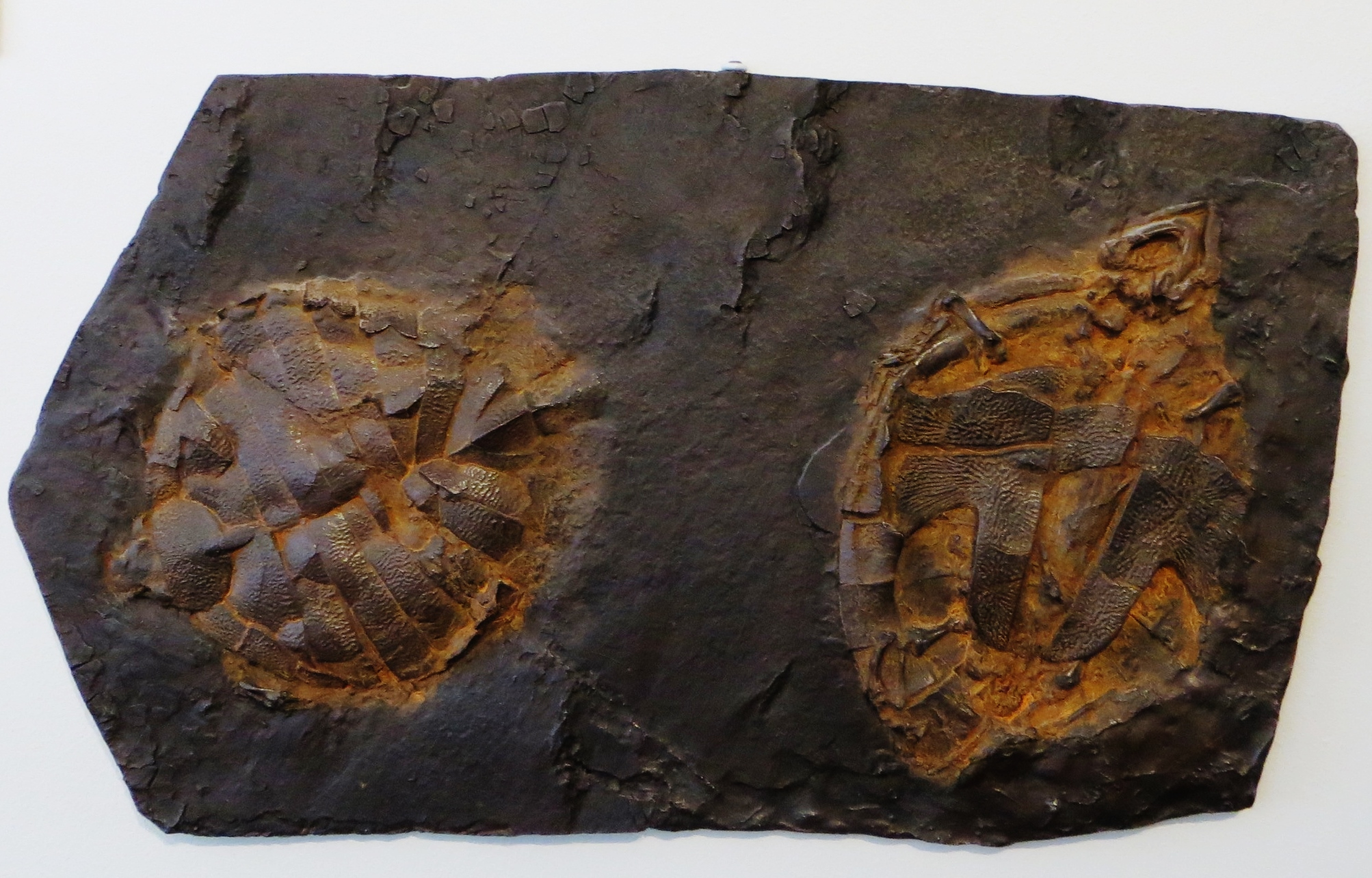 Fossil of turtles - Took the picture at Natural History Museum, Luzern